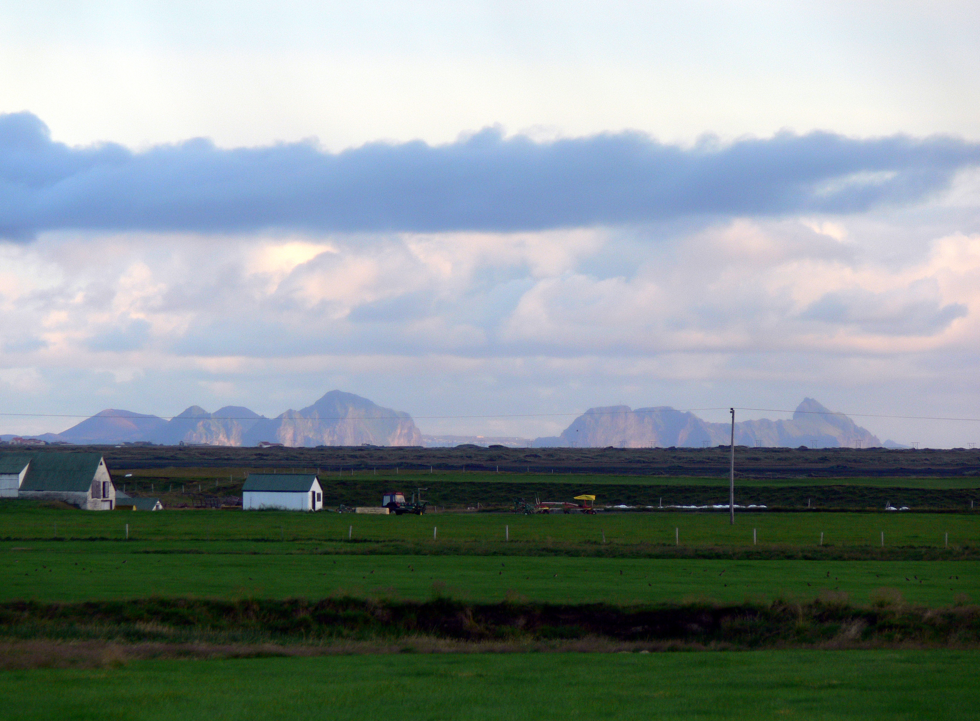 Vestmannaeyjar von Fljótshlið in Südisland aus.